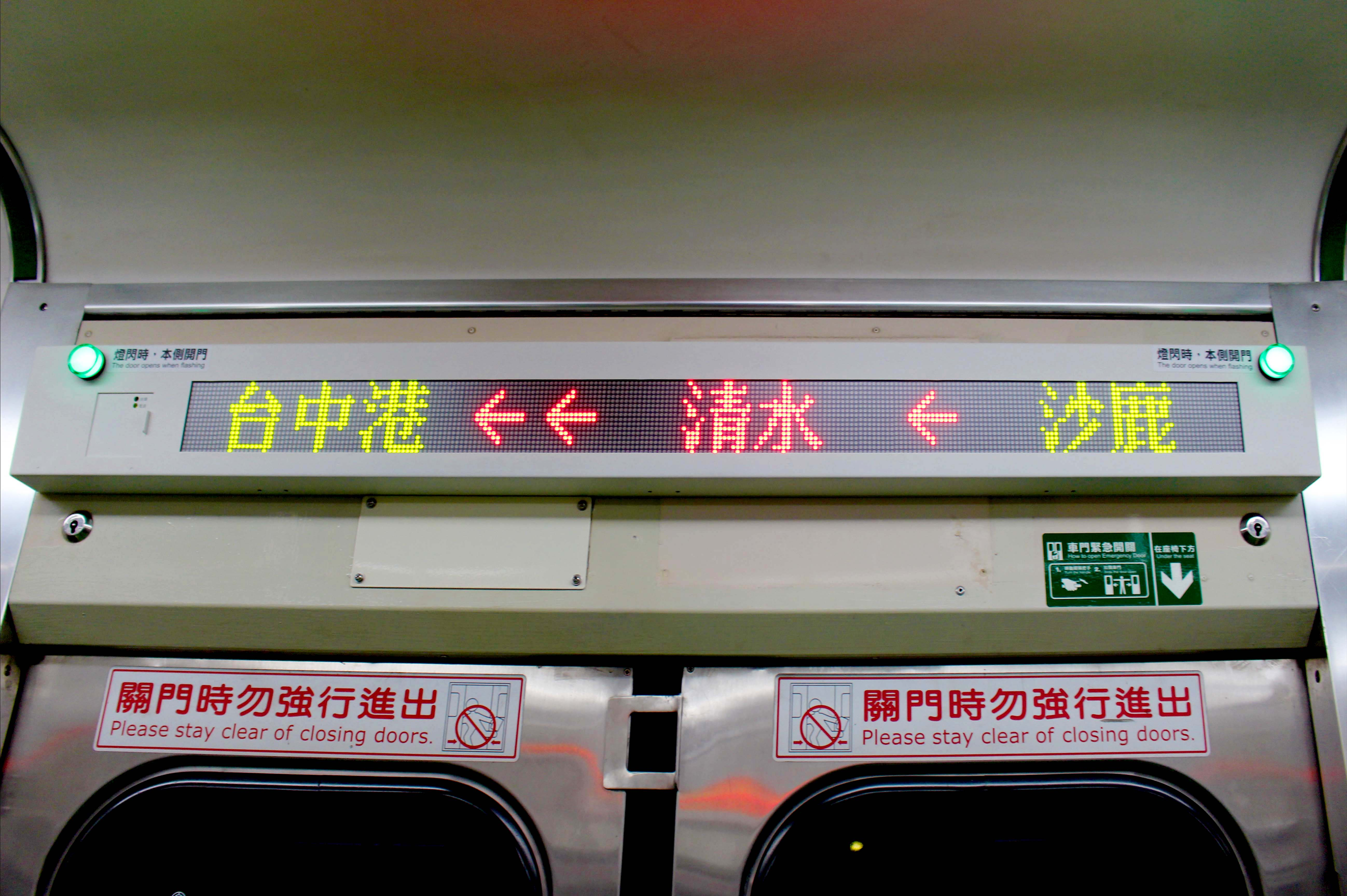 臺灣鐵路管理局EMU500型電聯車改裝後LED到站資訊顯示器。